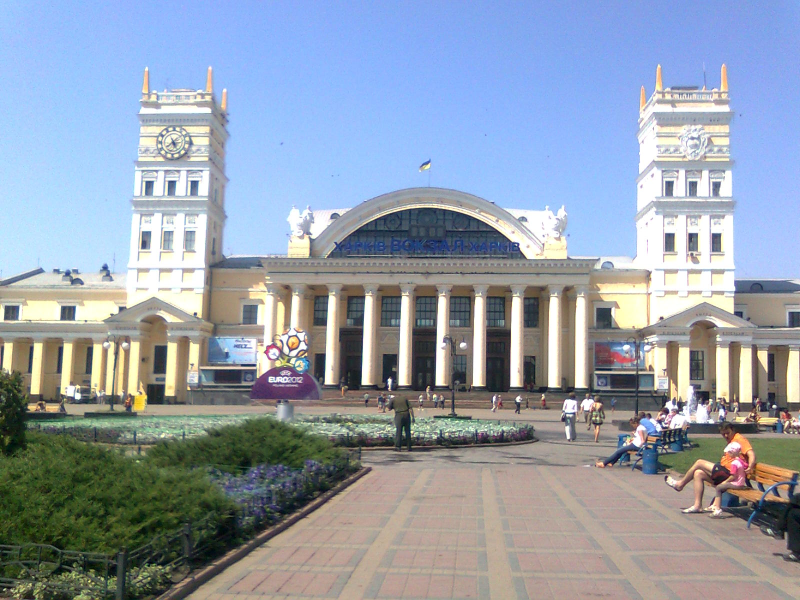 Изображен Ж/д вокзал в городе Харькове